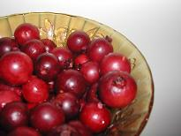 Photo d'un bol de goyaviers réunionnais.